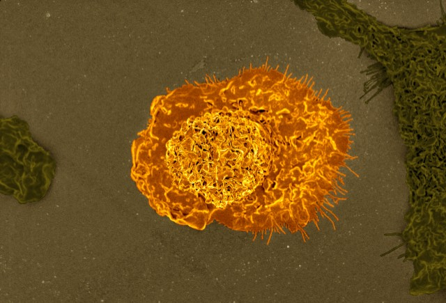 תא מקרופאג